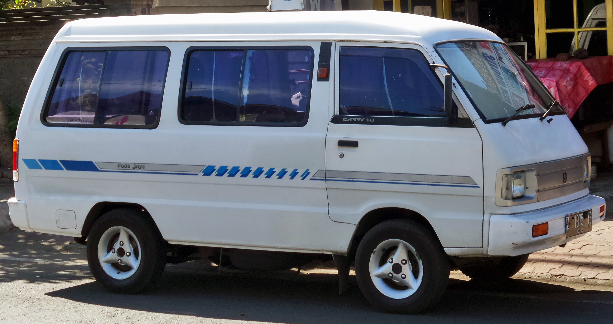 Suzuki Carry 1.0